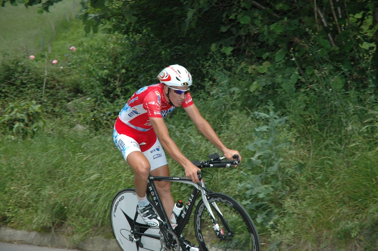 Alessandro Donati, Euskal Bizikleta 2007